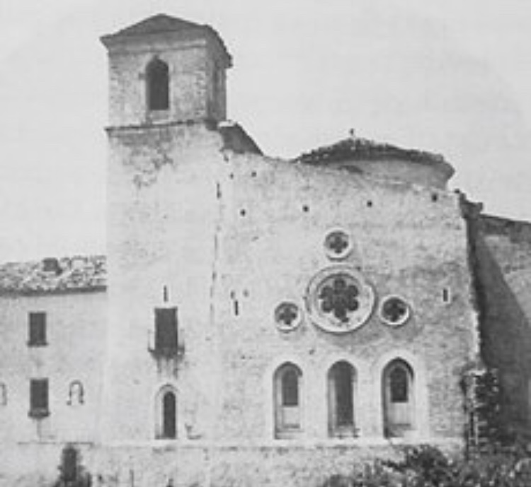 Interno dell'Abbazia Florense in stile Barocco (Anni '30) - Lato orientale